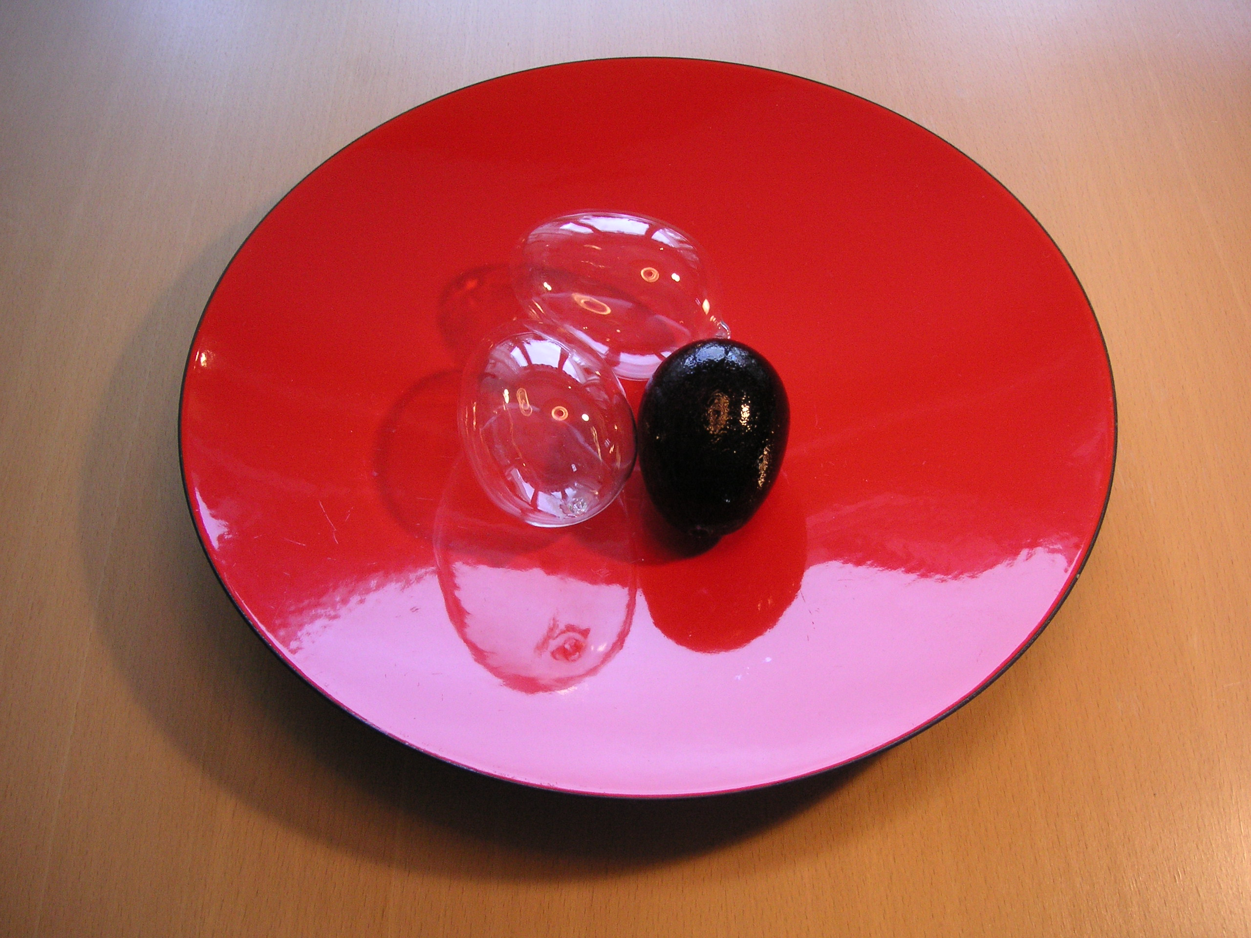 Herbert Krenchels Krenit-skål i röd